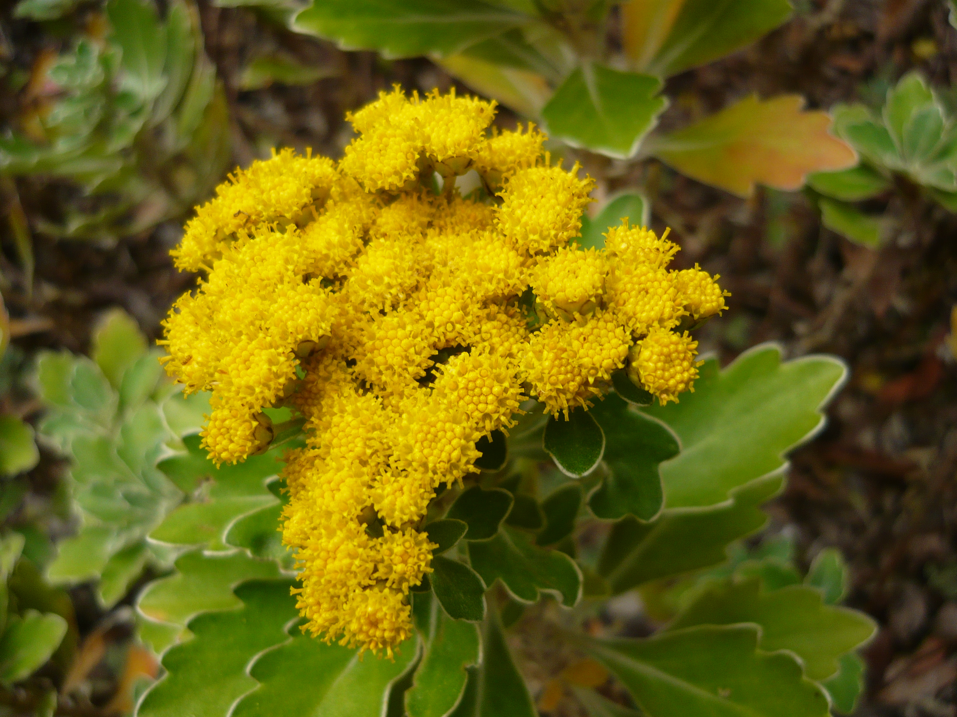 Ajania pacifica. Real Jardín Botánico de Madrid